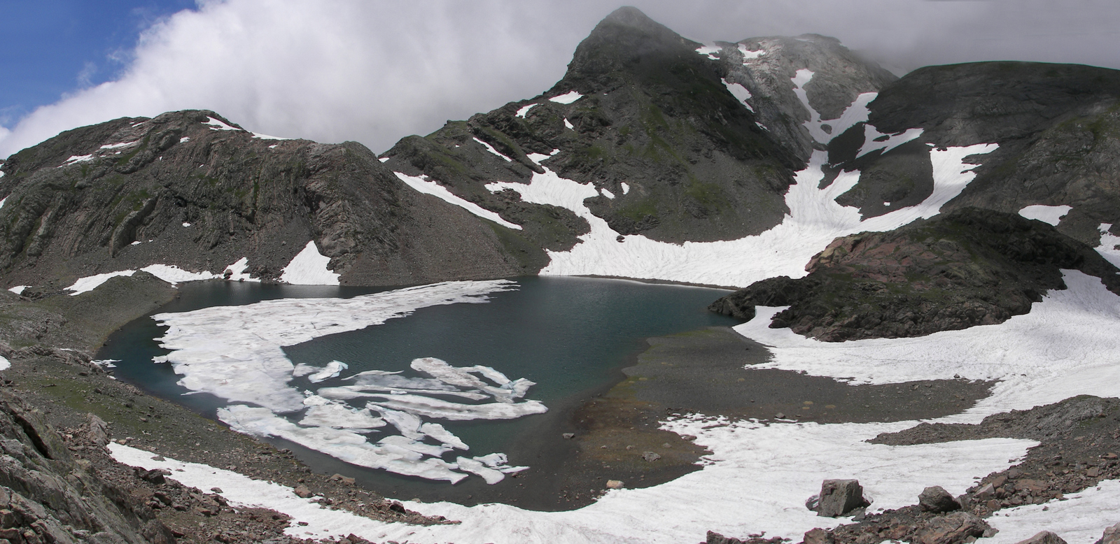 Alto Valle del Cinca This is a photography of a Site of Community Importance in Spain with the ID: ES2410052. Natura2000 entry, EEA entry